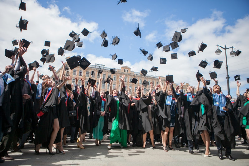 Церемония вручения дипломов магистрам и специалистам Университета ИТМО в 2014 году